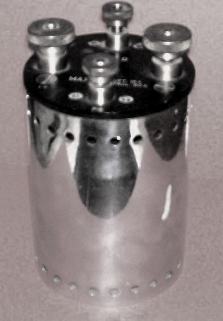 0,01 Ohmos normál-ellenállás